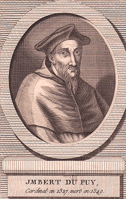 Cardinal Imbert du Puy